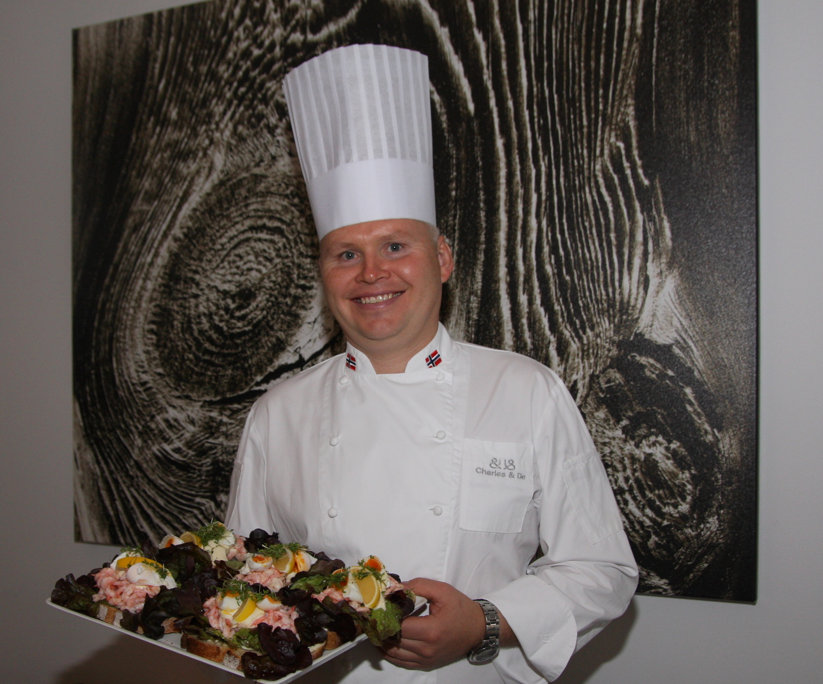 Charles Tjessem, norsk kokk - vinner av Bocuse d'Or